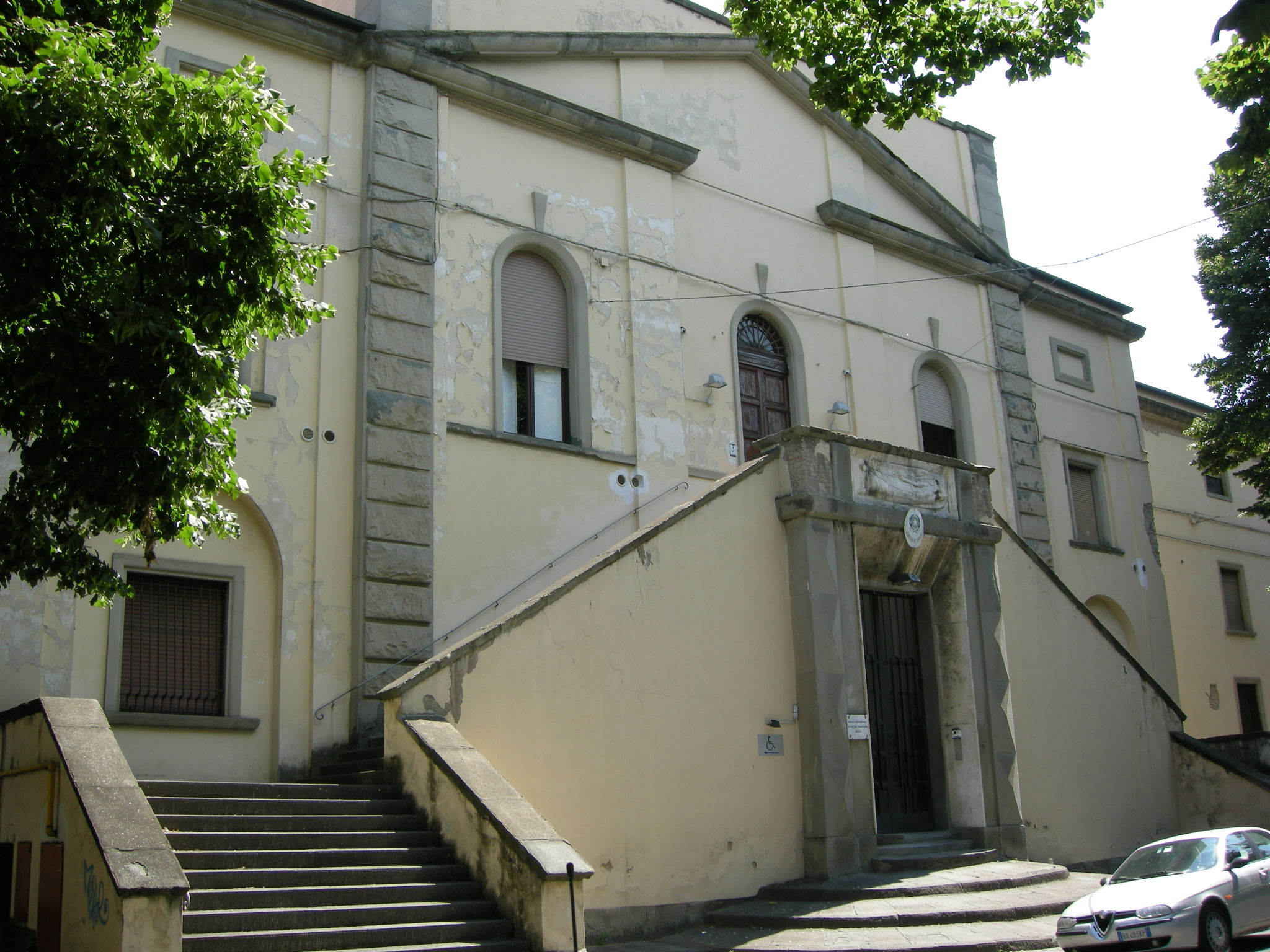 Casa del Littorio (Prato)